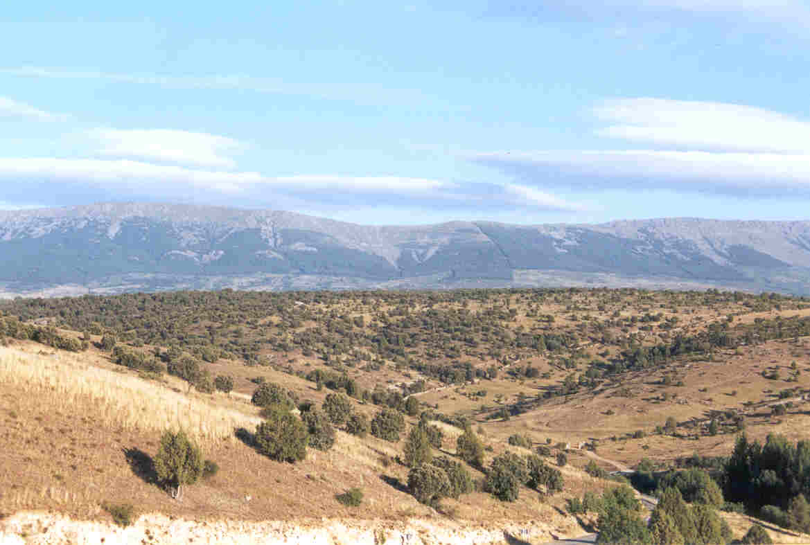 Nubes lenticulares sobre Somosierra desde la provincia de Segovia. Autor Fev. Fecha: junio 2002.